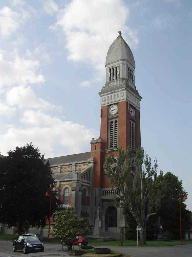 Eglise de Steenwerck (59, Nord)